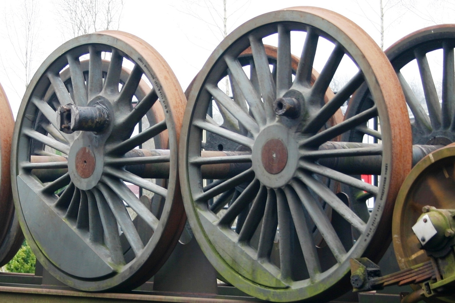 Gegengewicht auf Treibrädern von Dampflokomotiven